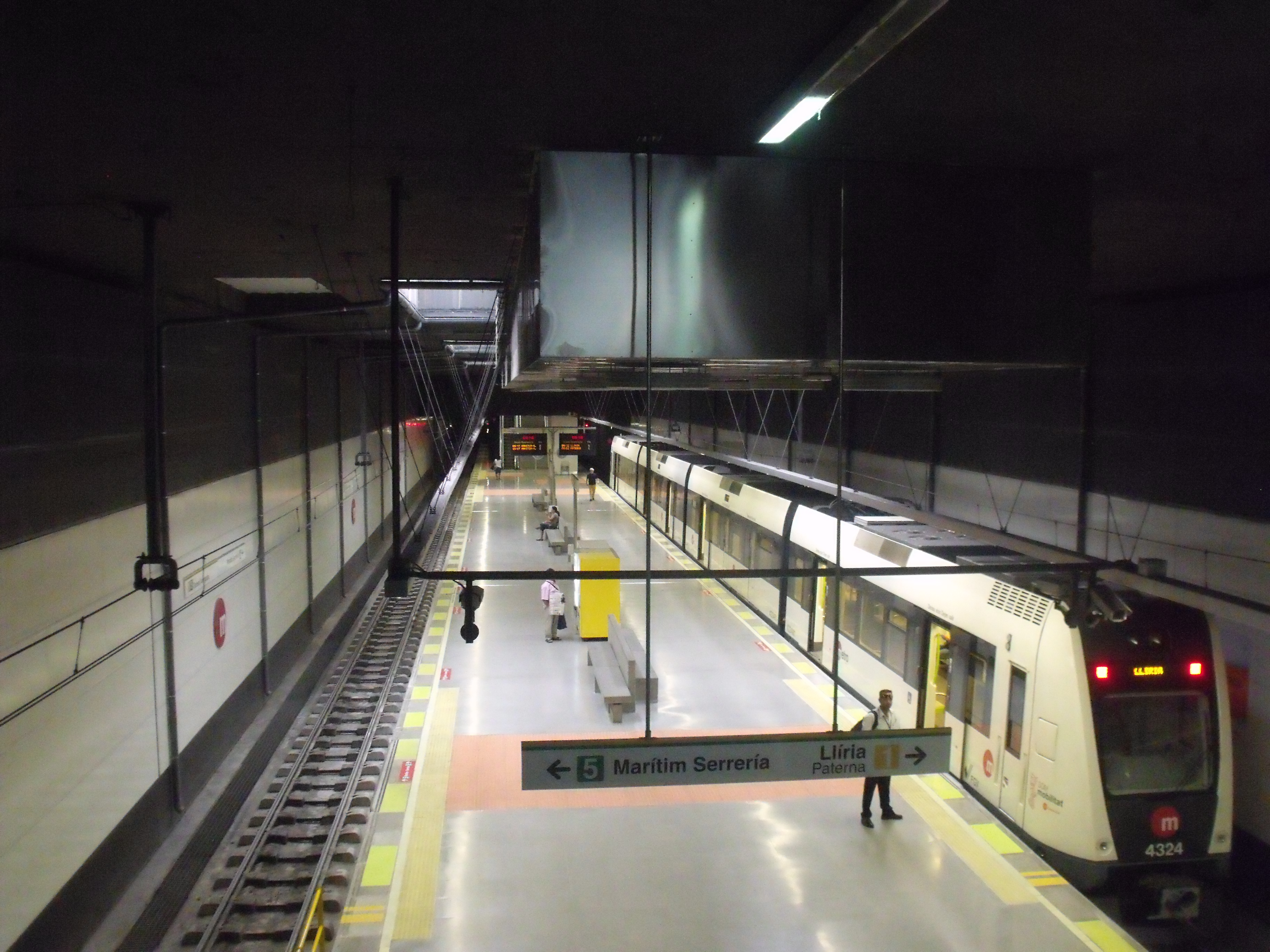 ppendiente